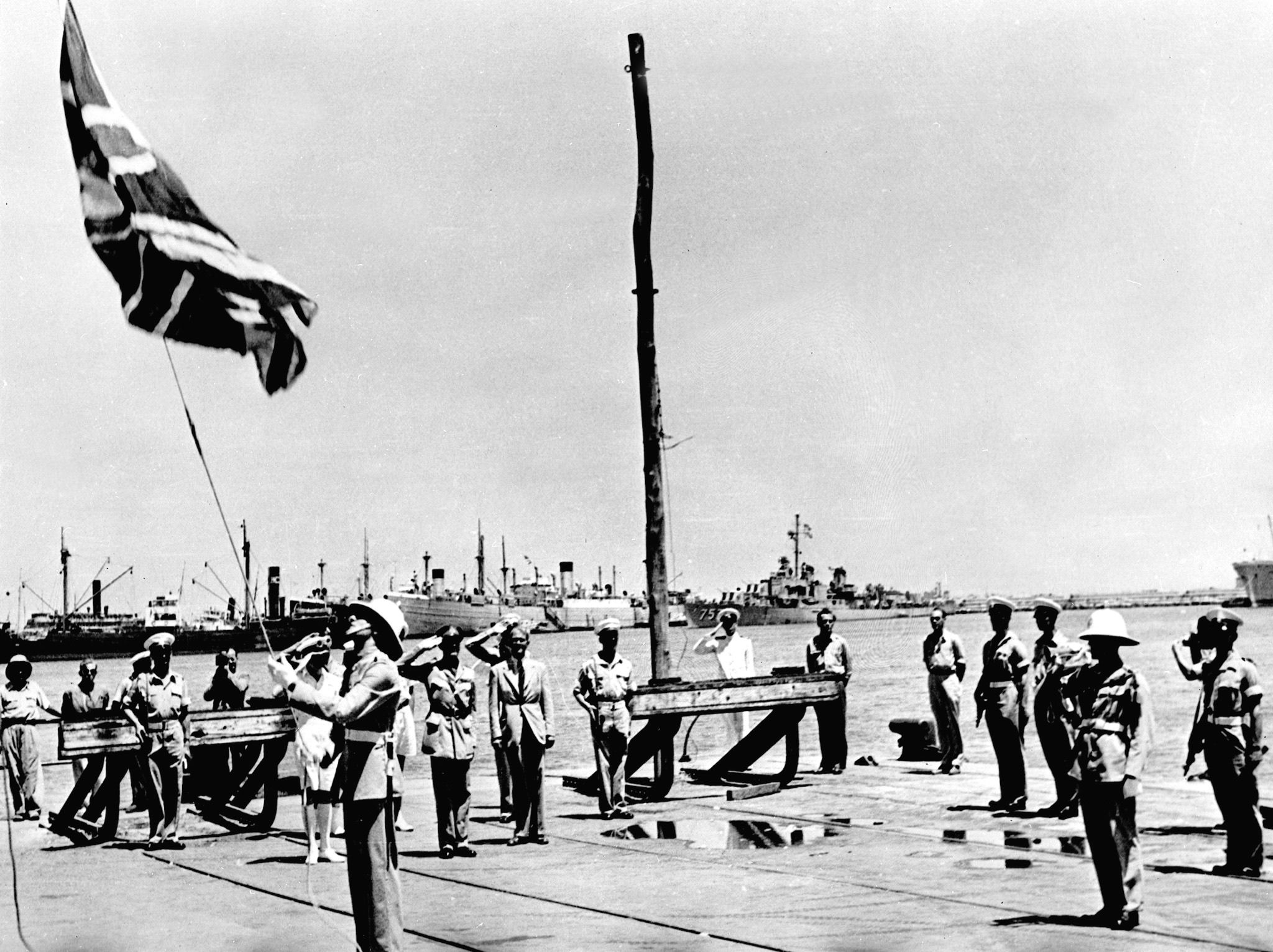 עזיבת הבריטים מסדר מסירת נמל חיפה לעיריה ברקע הסיירת הבריטית פואבה.